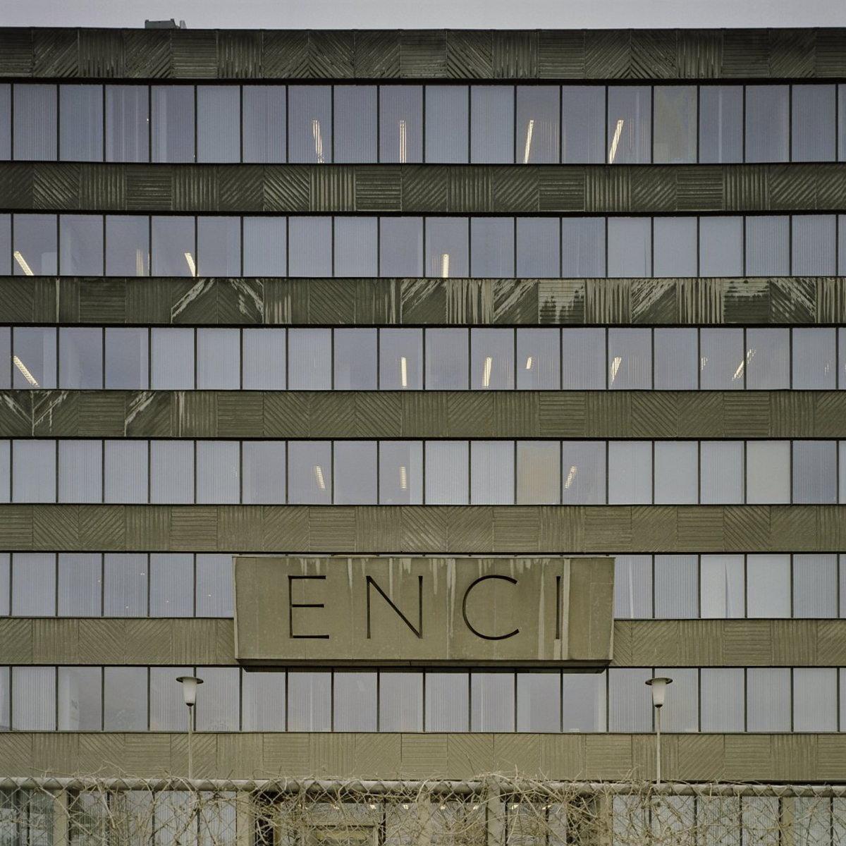 Enci (Eerste Nederlandse Cement Industrie): Geveltekst ENCI op de voorgevel van het vierde gebouw